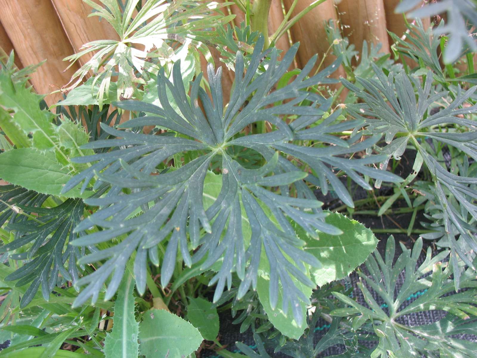 Hoja de Aconitum napellus. Jardín botánico de las Pardines. Encamp, Andorra.